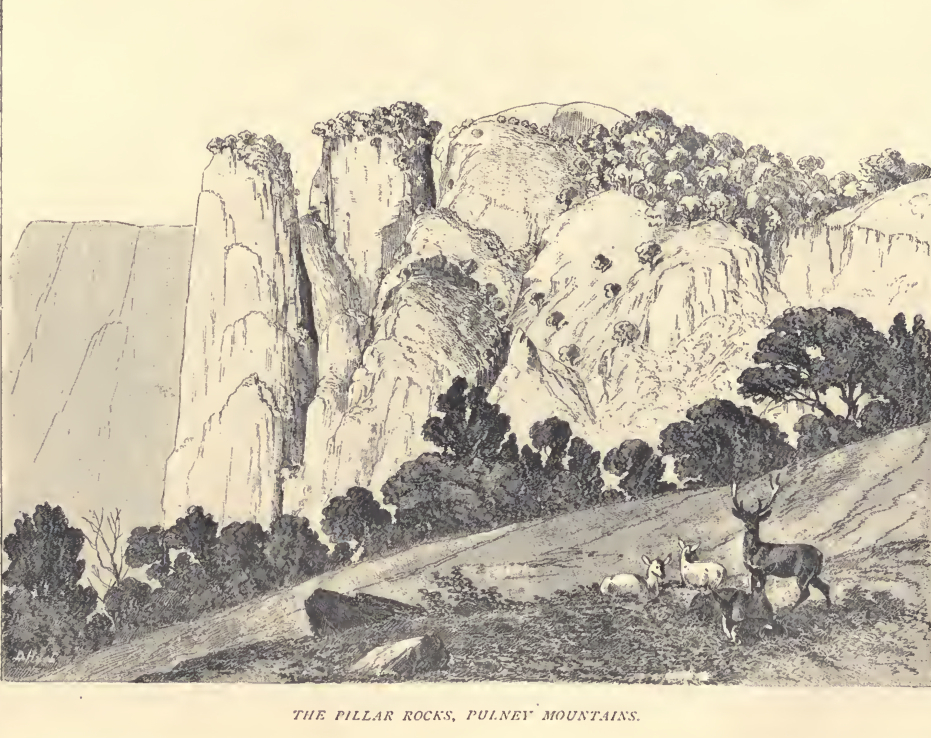 Douglas Hamilton, Pillar Rocks